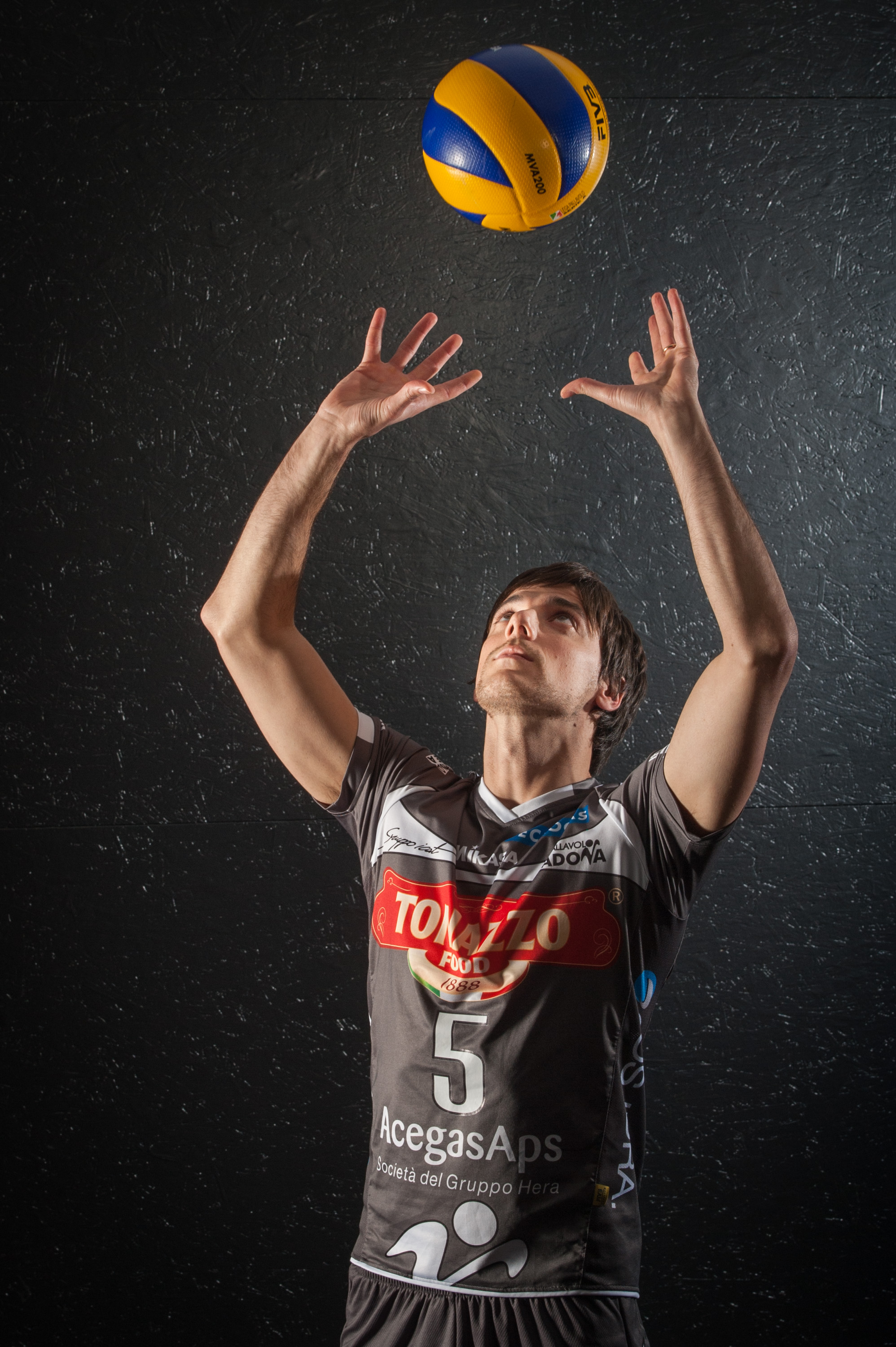 Santi Orduna